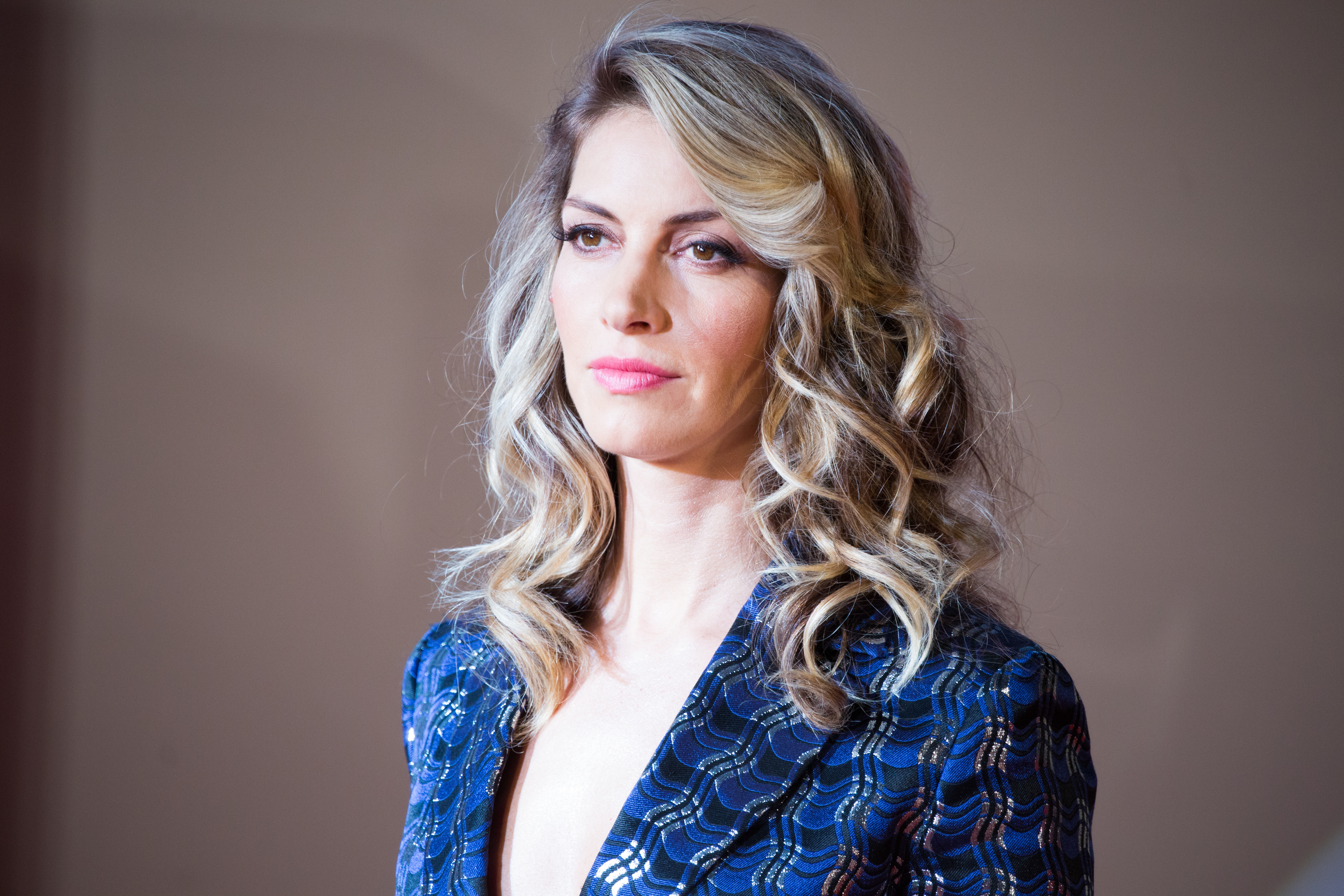 ブライト ジャパン・プレミア レッドカーペット ドーン・オリヴィエリ